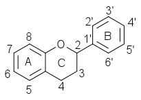 structure des flavonoïdes